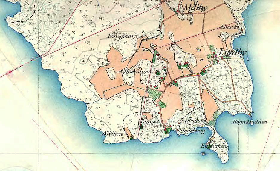 Lindby på Häradsekonomiska kartan